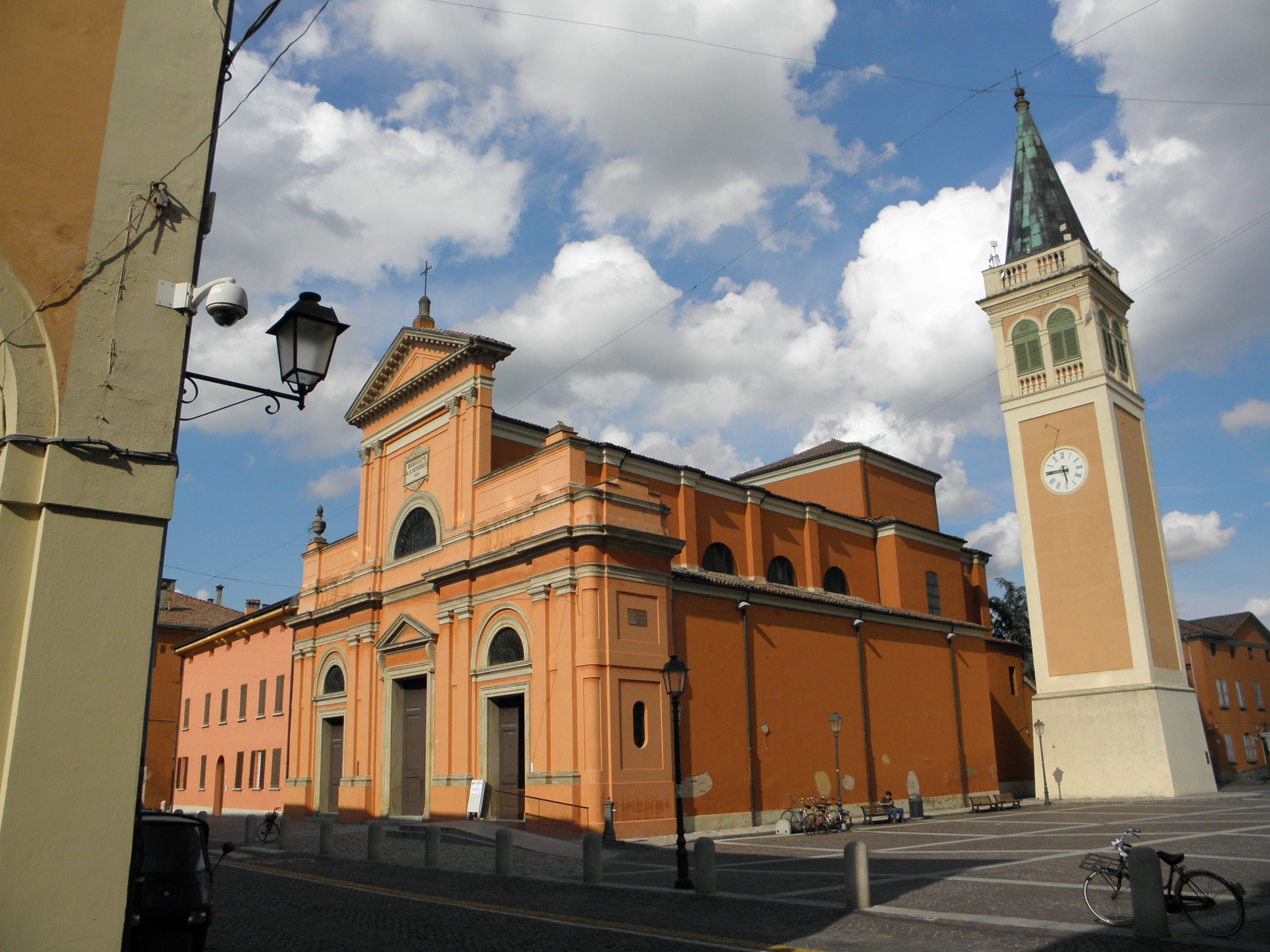 San Giorgio di Piano, la chiesa parrocchiale di San Giorgio martire.